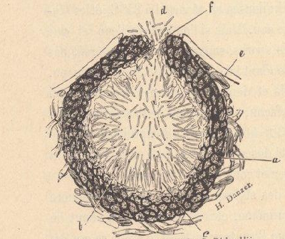 Spermogonio de Guignardia bidwellii